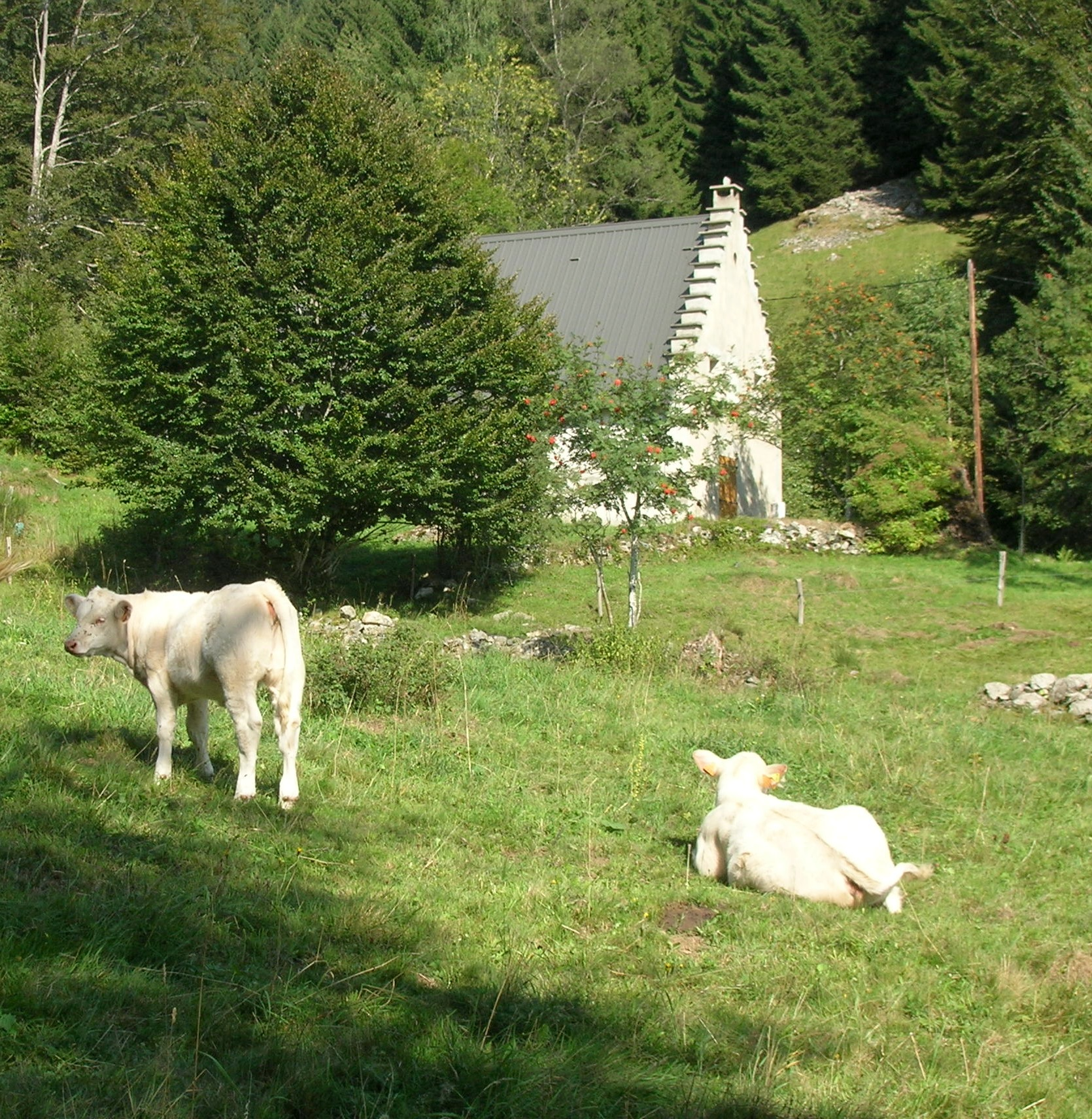 Séchilienne vers le Lac Luitel, Isère, AuRA, France.